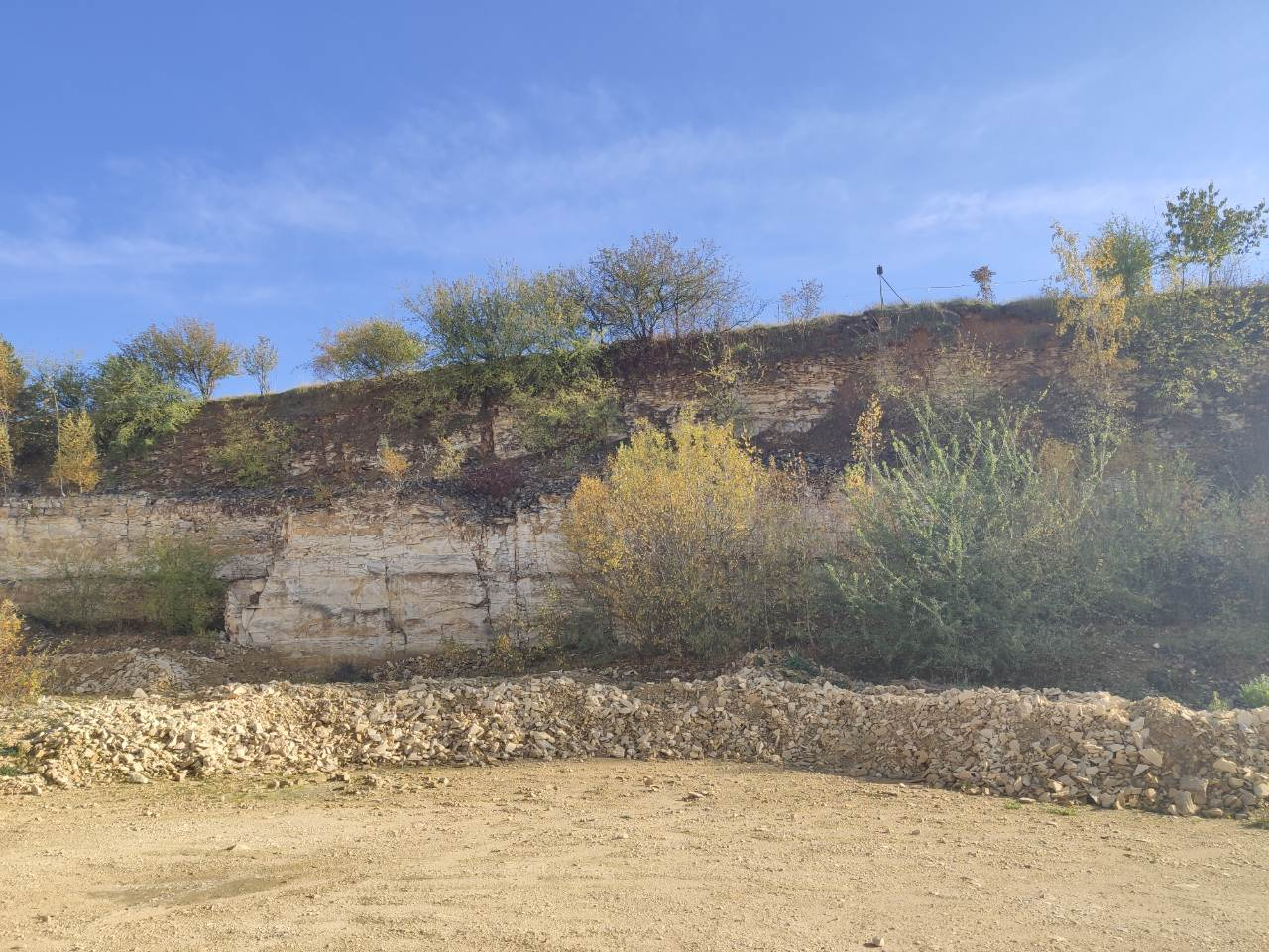 Zarůstání periferních částí Opukového lomu u Přední Kopaniny rostlinstvem.